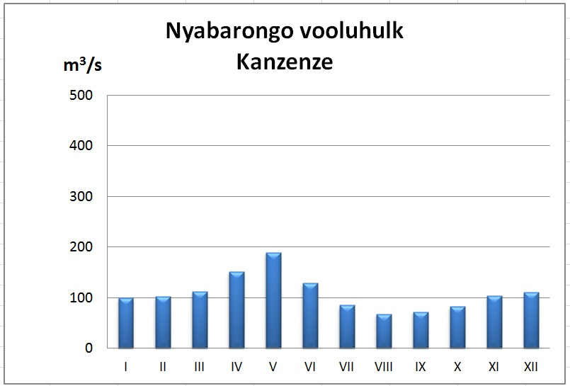 Nyabarongo vooluhulk